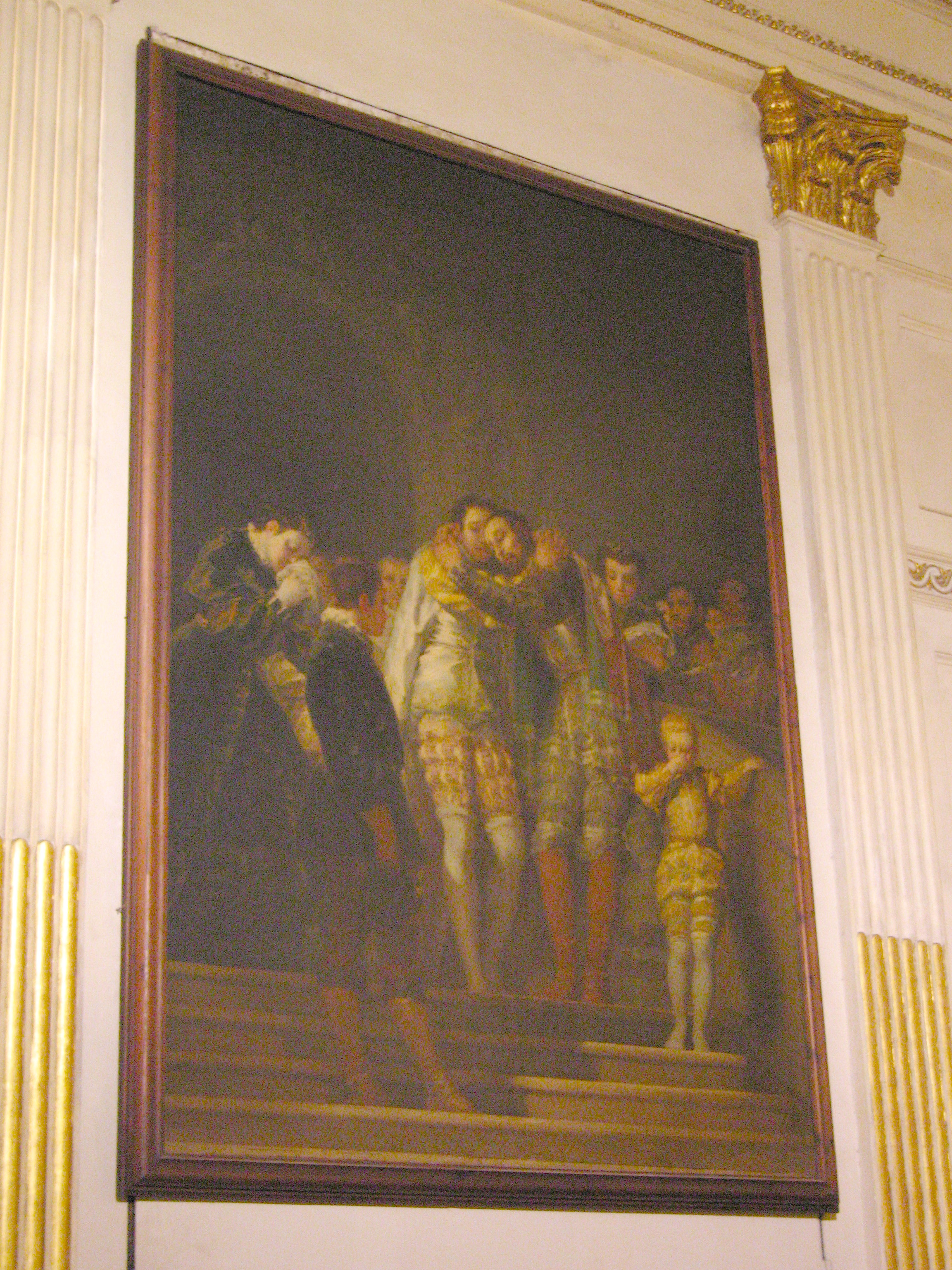 Quadre de Goya (Seu de València)